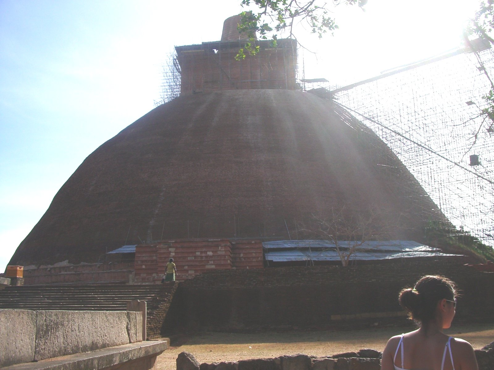 antiga gran pagoda (en restauració amb ajut de l'Unesco) a Anuradhapura, foto feta per J. Ollé el juliol del 2006